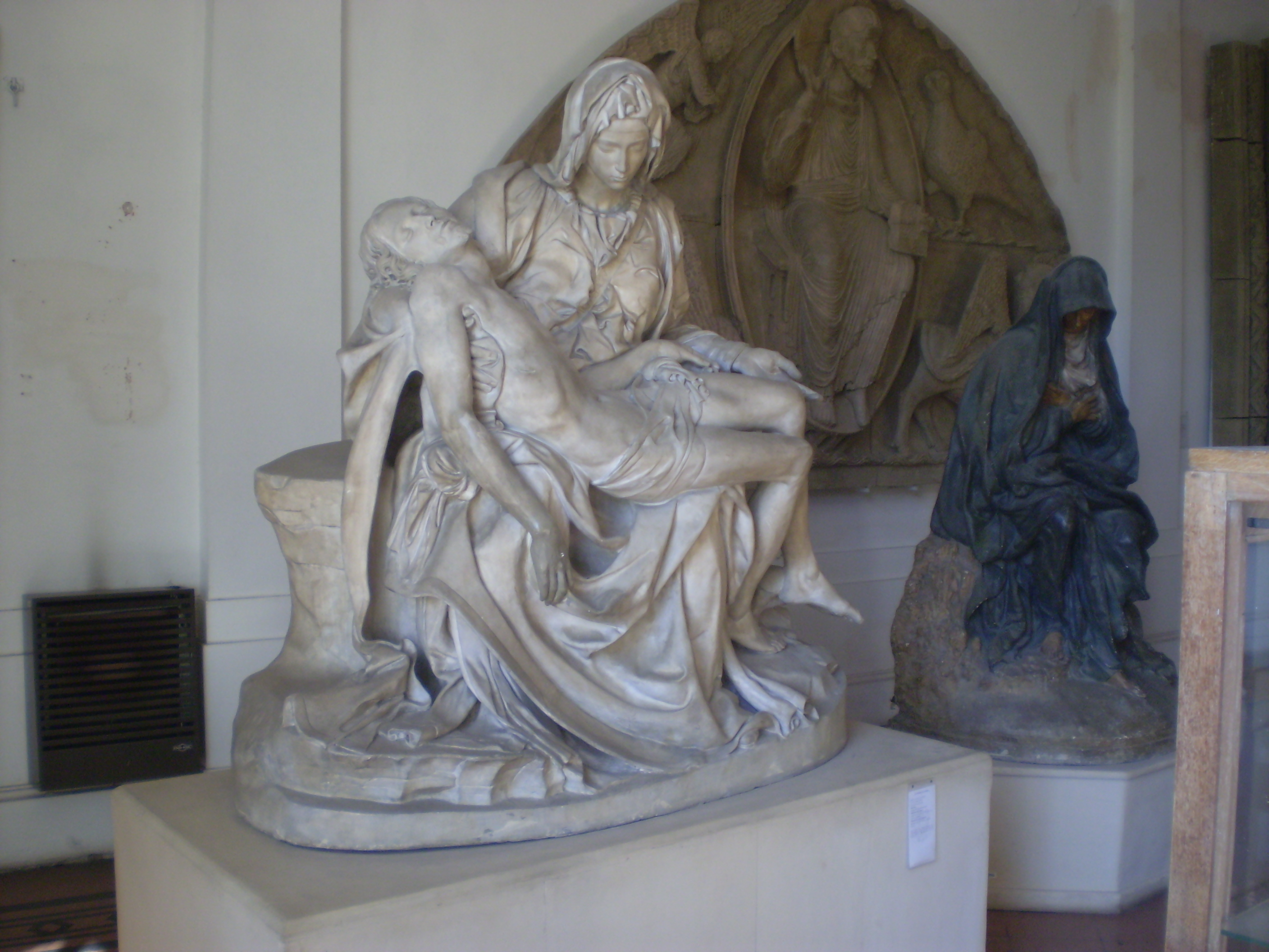 Réplica en el Museo de Escultura Comparada Ernesto de la Cárcova (Museo de calcos), Buenos Aires